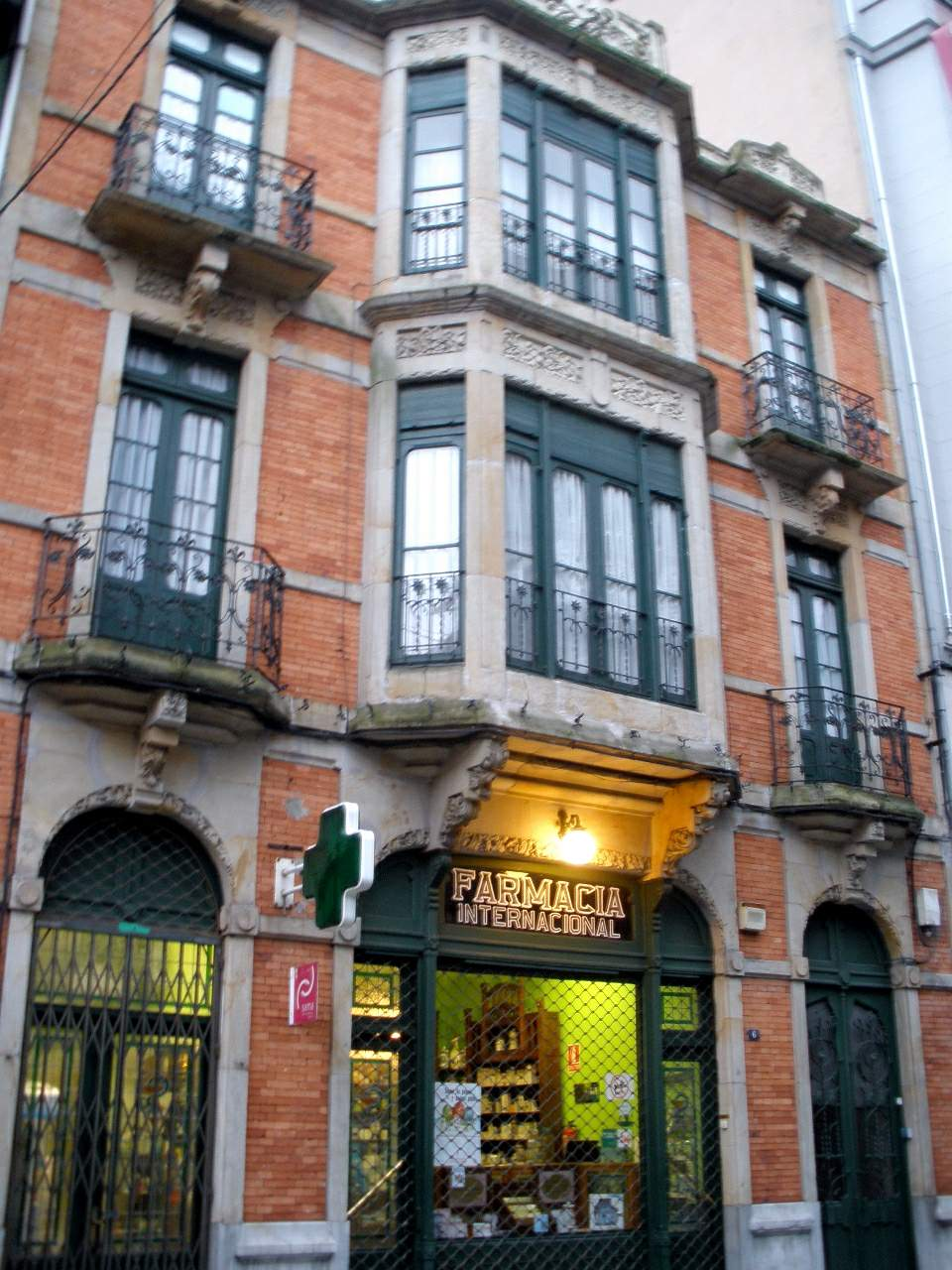 Paisaje urbano de Sama de Langreo (Asturias)